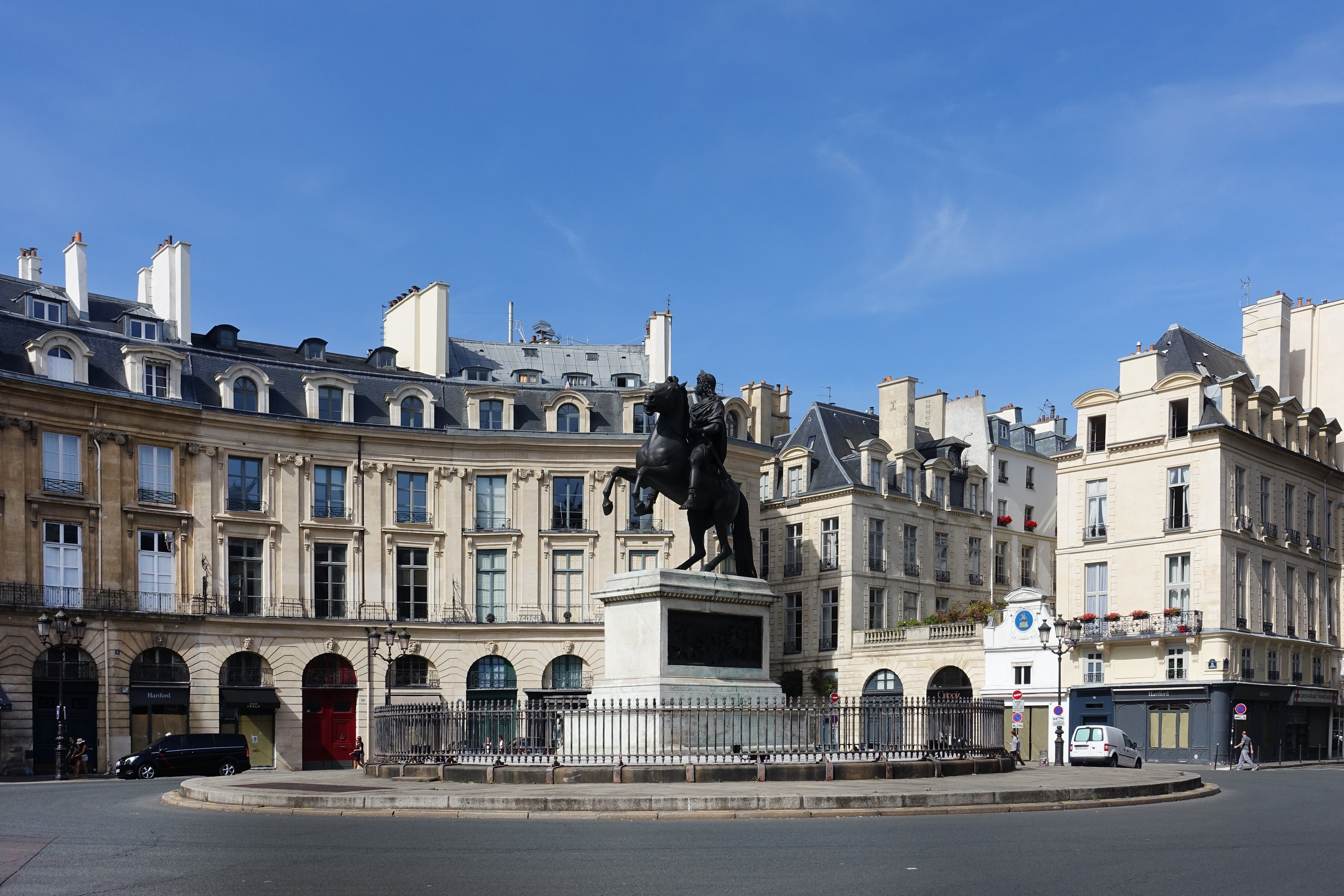 Place de la Victoire @ Paris